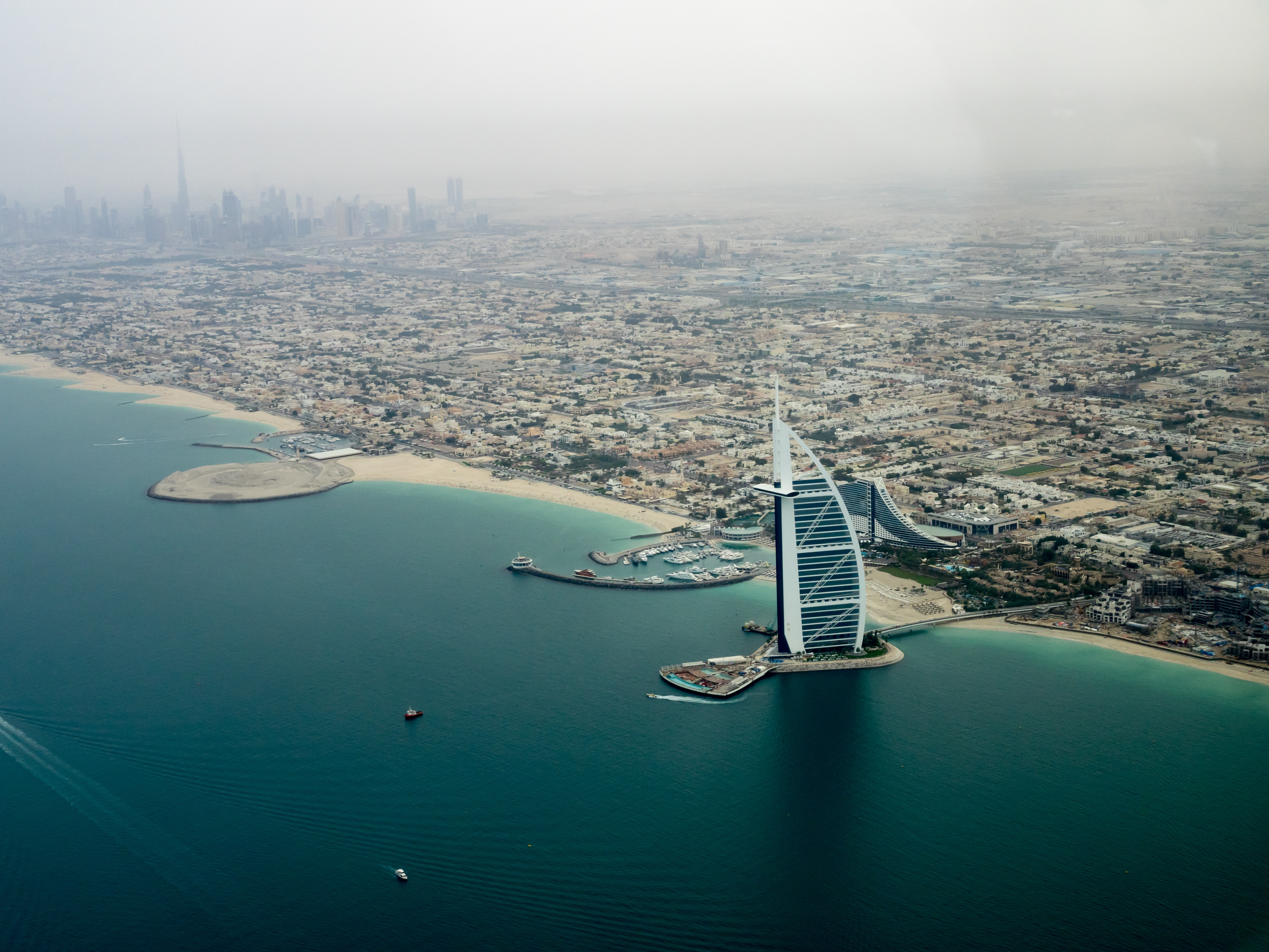 Vista aérea sobre Dubai